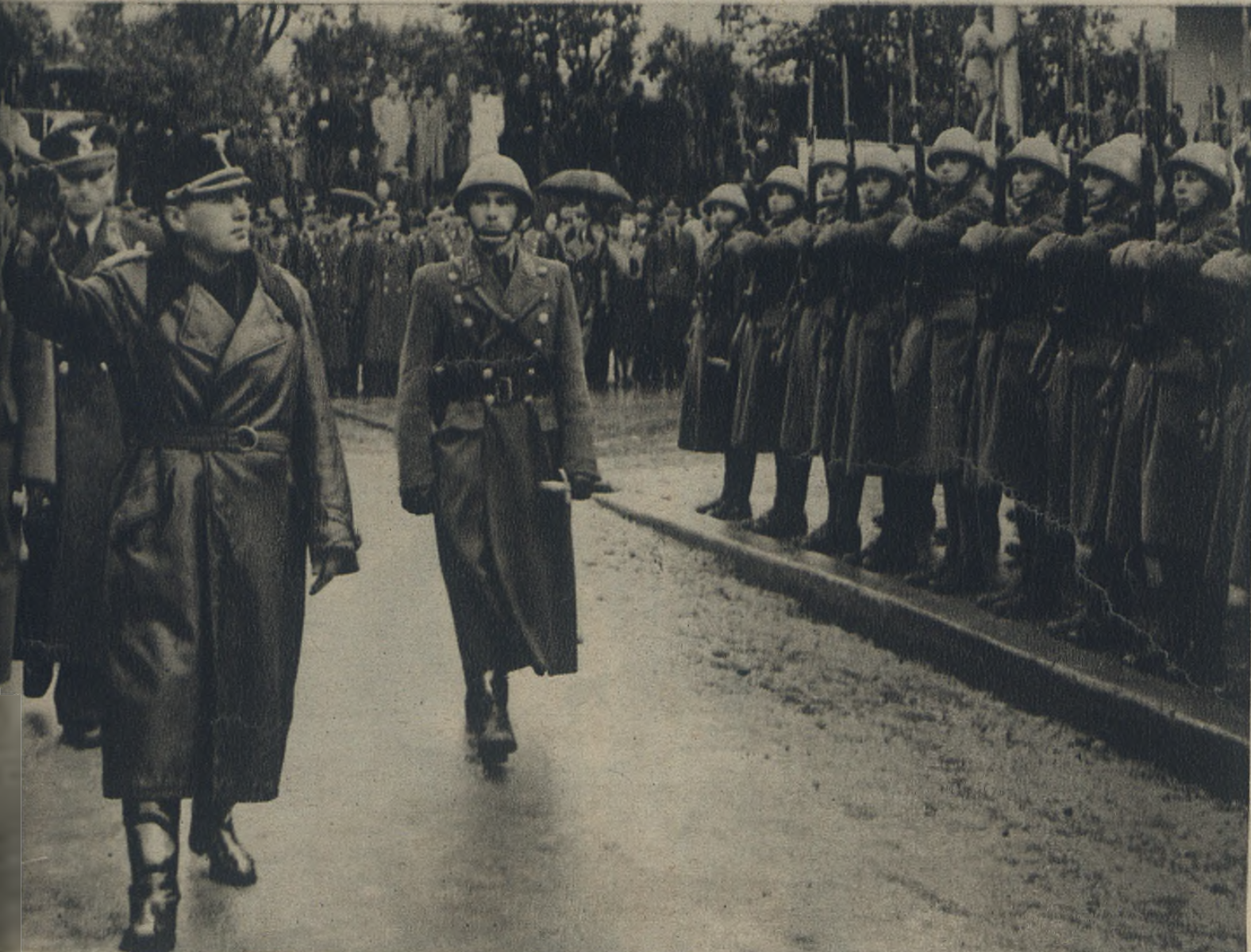 "Slávnostné otvorenia Výstavy Ríšsky pracovne sluiby v Žiline. Po výstave v Bratislave Ríšska pracovná služba usporiadala výstavu v Žiline, na ktorej sa zúčastnil minister vnútra A. Mach. Vidíme ho pri prehliadke vojska."